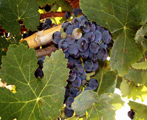 Grappolo d'uva